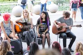 Da sinistra: Lovelis N., Miller, Lovelis R. e Moreta